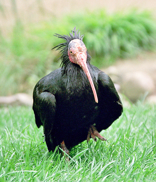 Geronticus eremita (de: Waldrapp) at the Tiergarten Schönbrunn in Vienna